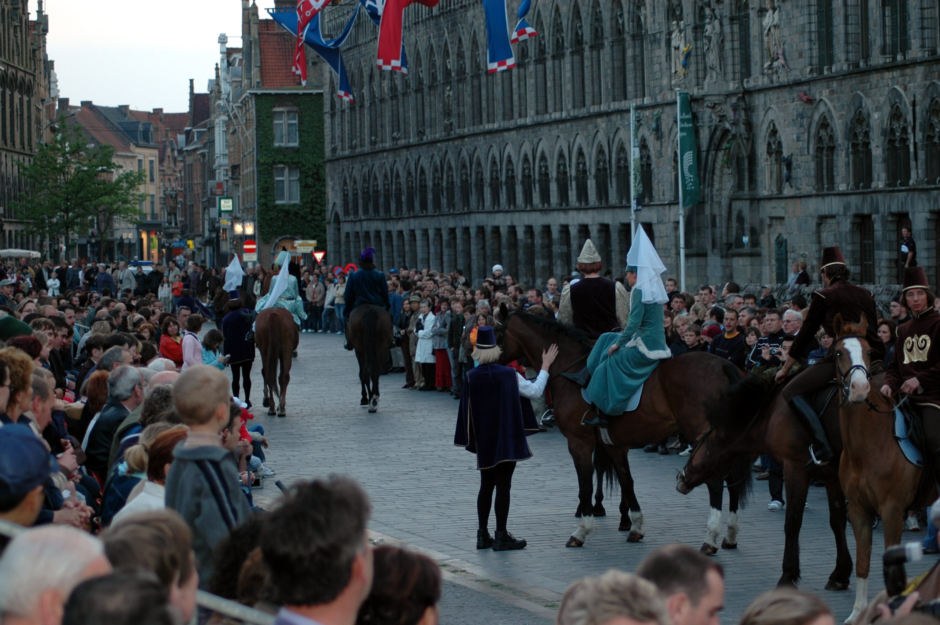 Kattenstoet nl:2006 in Ieper oorspronkelijk auteur: storem op